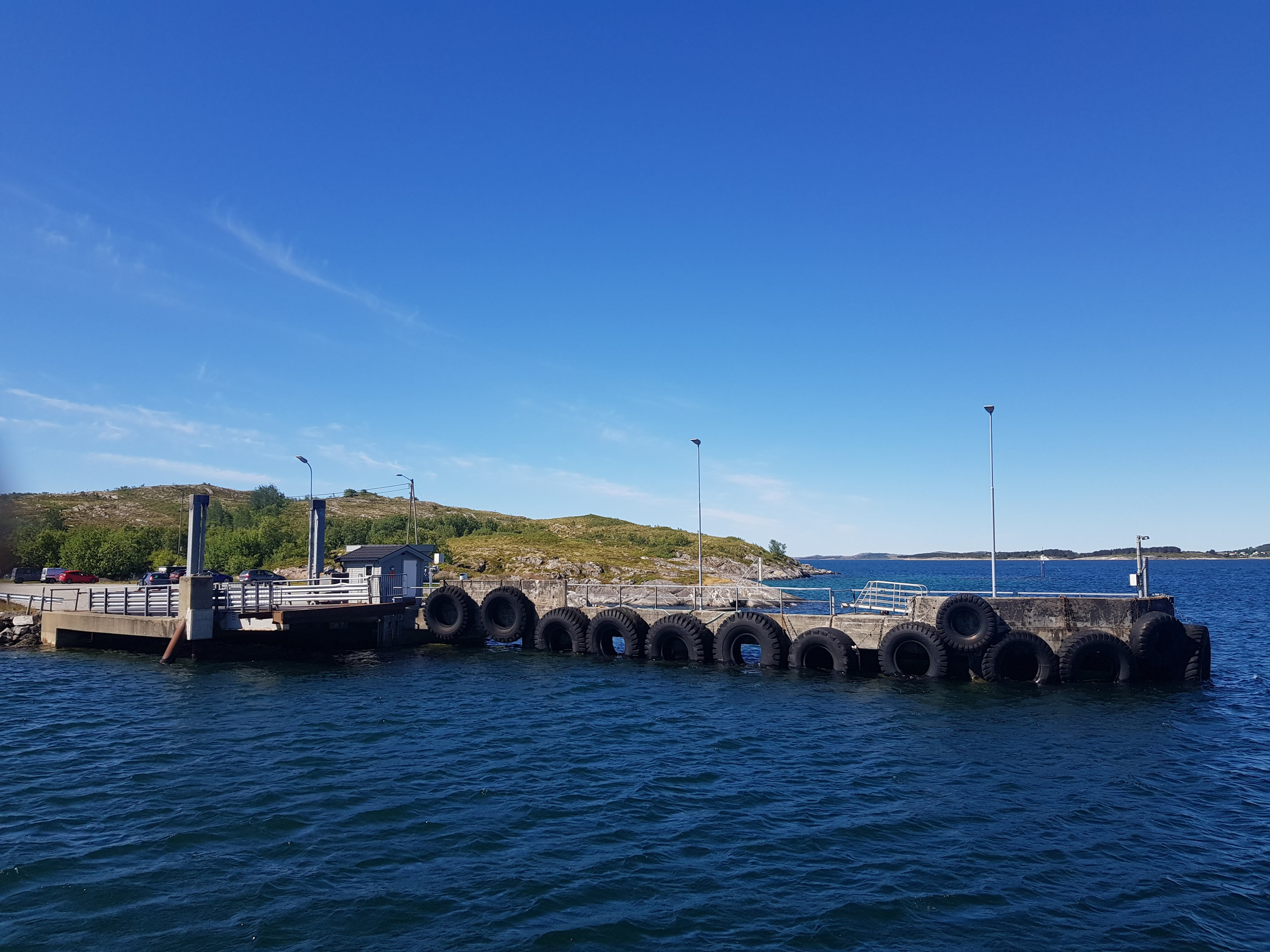 Fergeanløpet på Mindlandet.